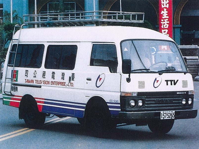 1990年4月28日，臺灣電視公司啟用第三代商標，臺灣電視公司以裕隆好馬747廂型車打造的轉播車157-5265隨之改用第三代商標。